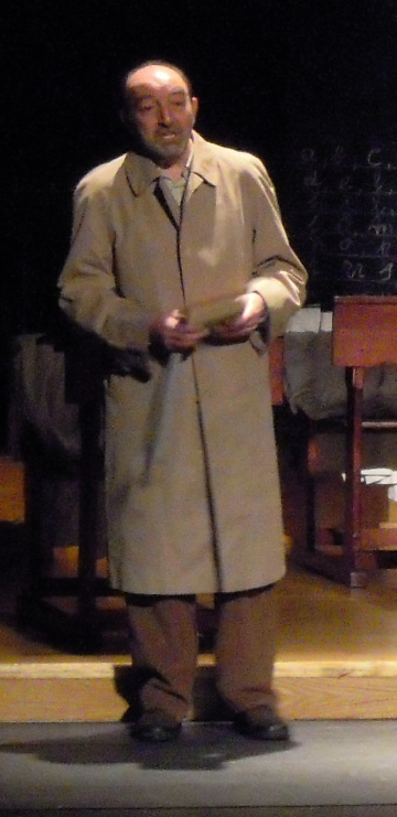 Xosé Manuel Olveira 'Pico' na representación da obra O florido pénsil, no Pazo da Cultura de Pontevedra